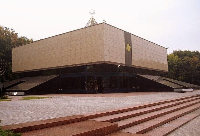 Мемориальная синагога на Поклонной горе Москва